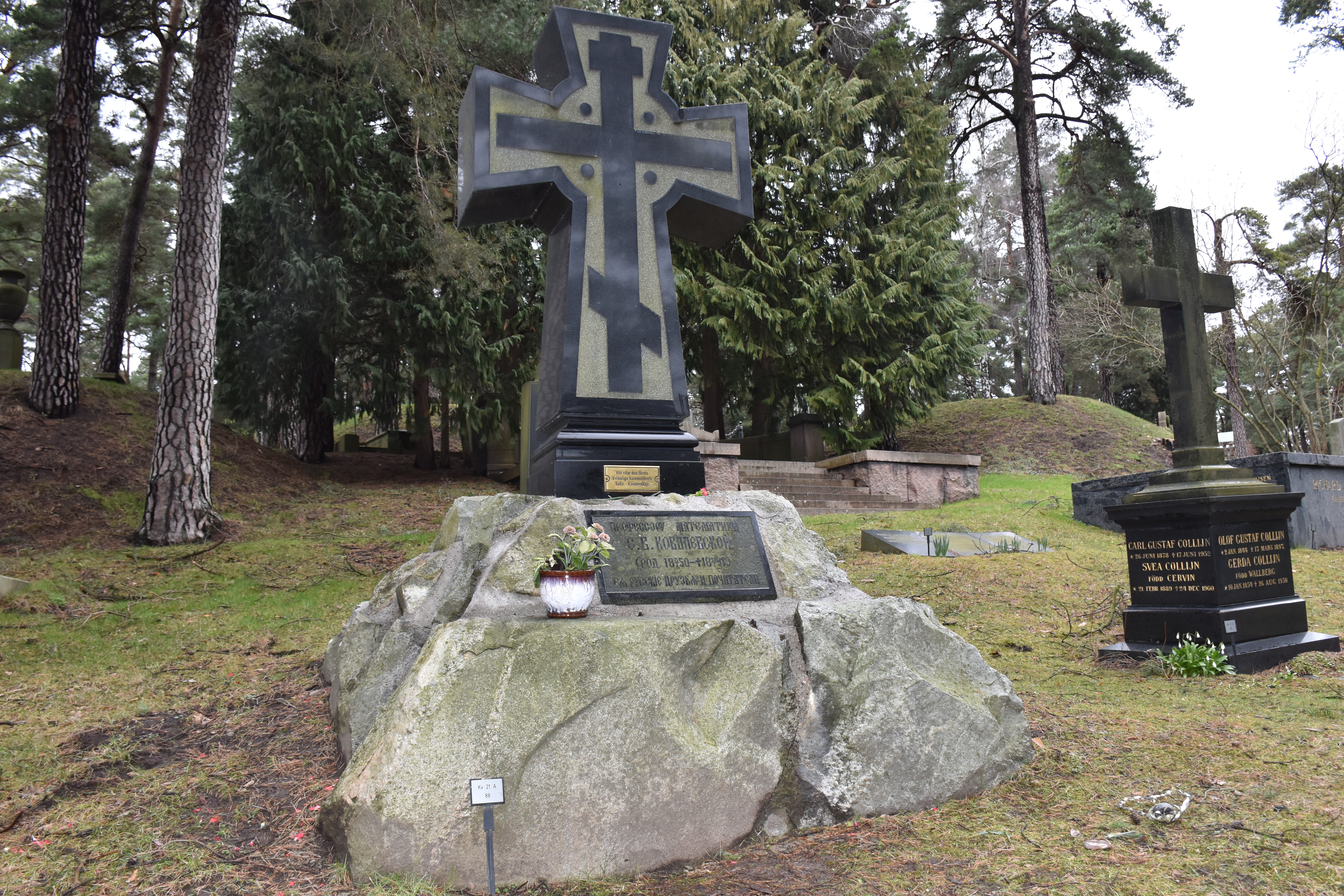 Магіла Соф'і Кавалеўскай